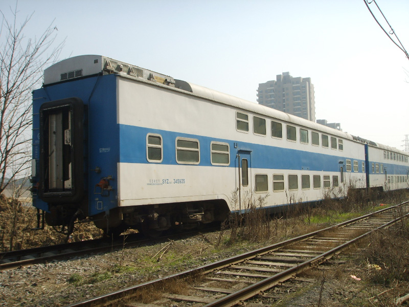 停靠在南昌电厂专用线的NZJ1动车组